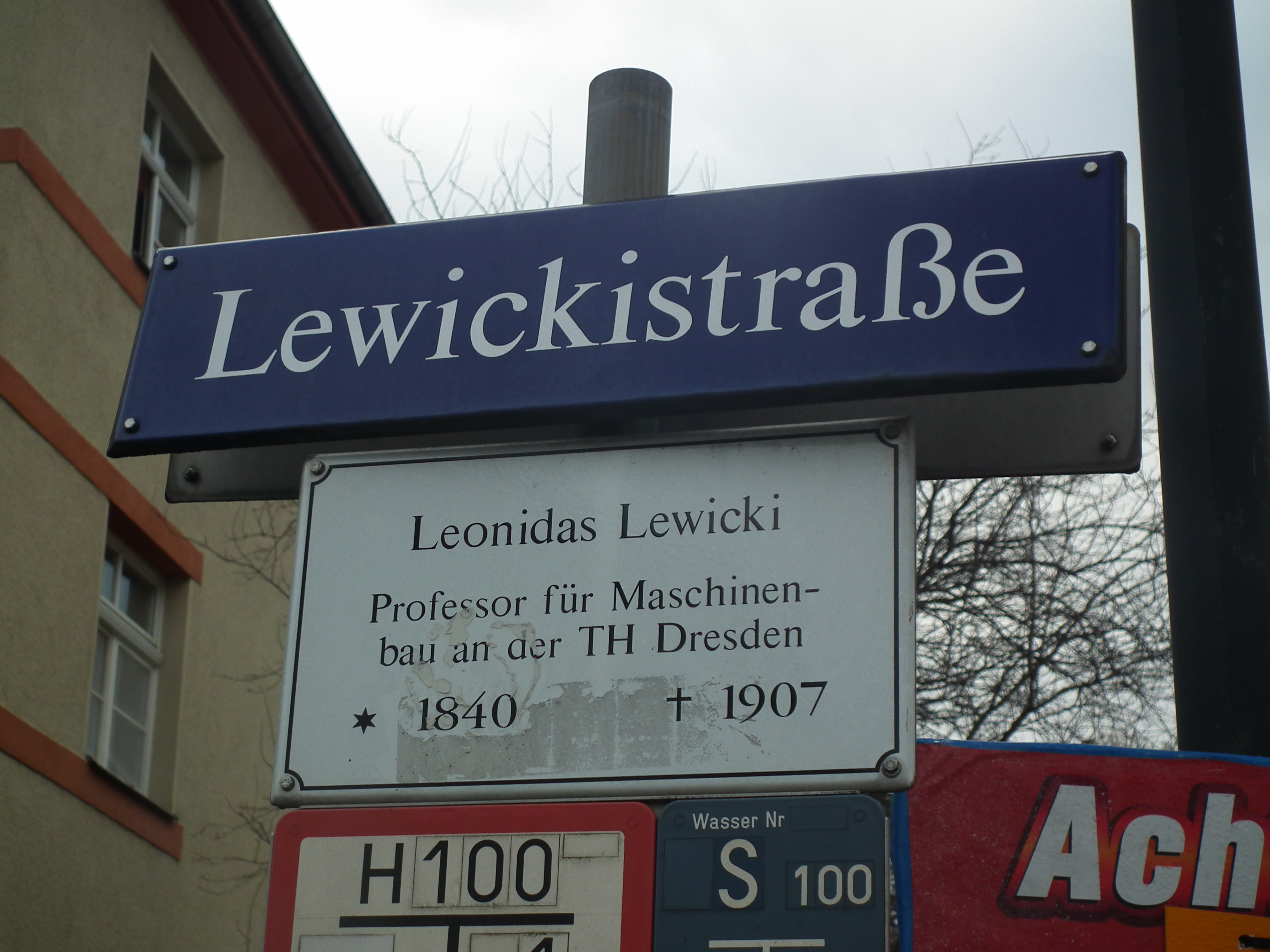 Spaziergang durch Tolkewitz, Laubegast, Seidnitz und Striesen